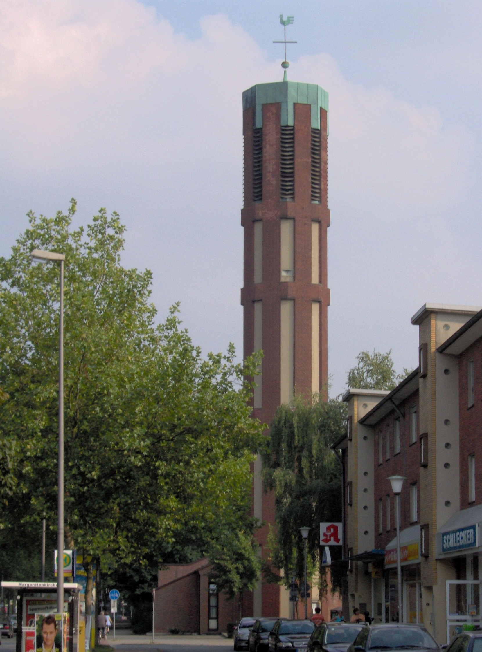 St. Margareta in Münster